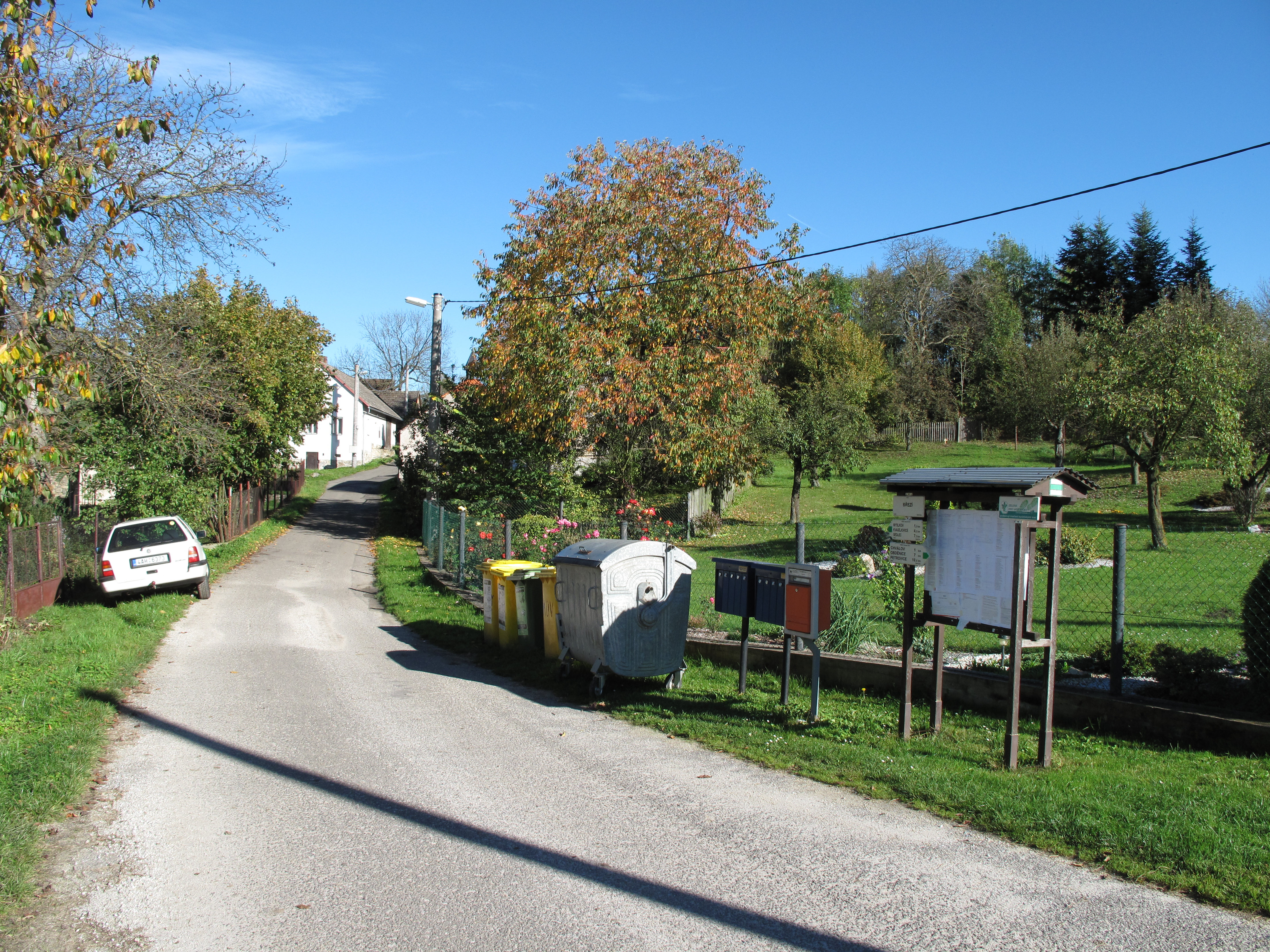 Silnice v Březí. Okres Příbram, Česká republika.